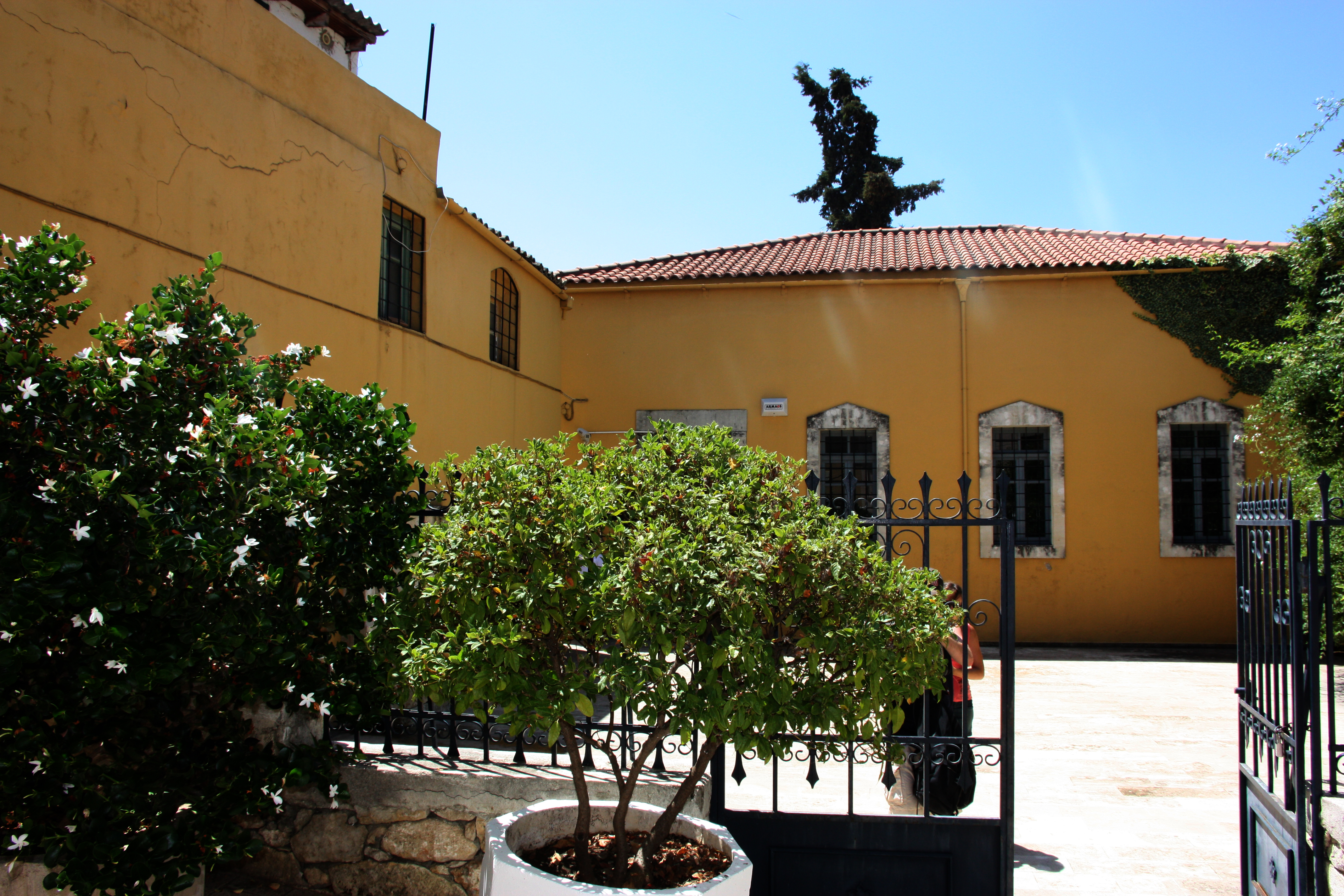 Musée archéologique d'Archanes